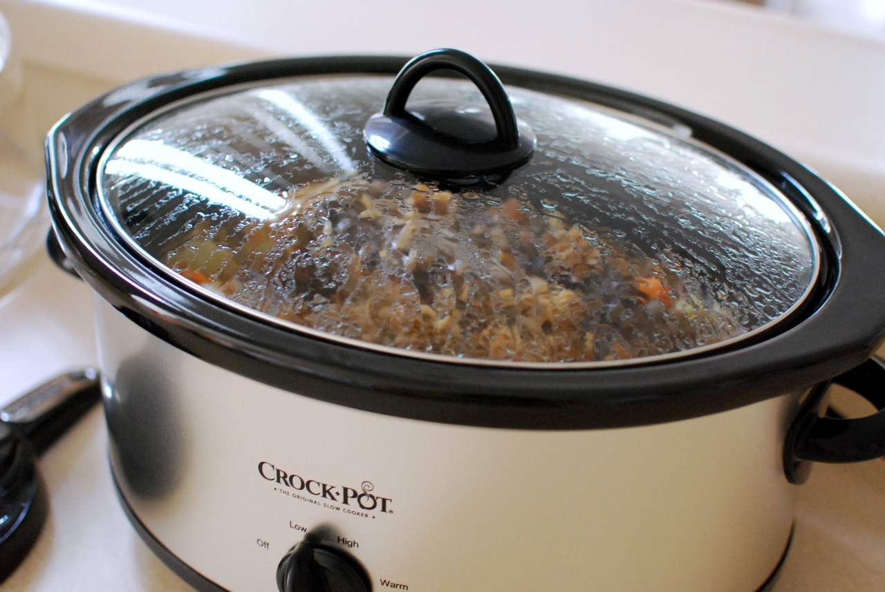 6-quart crock pot